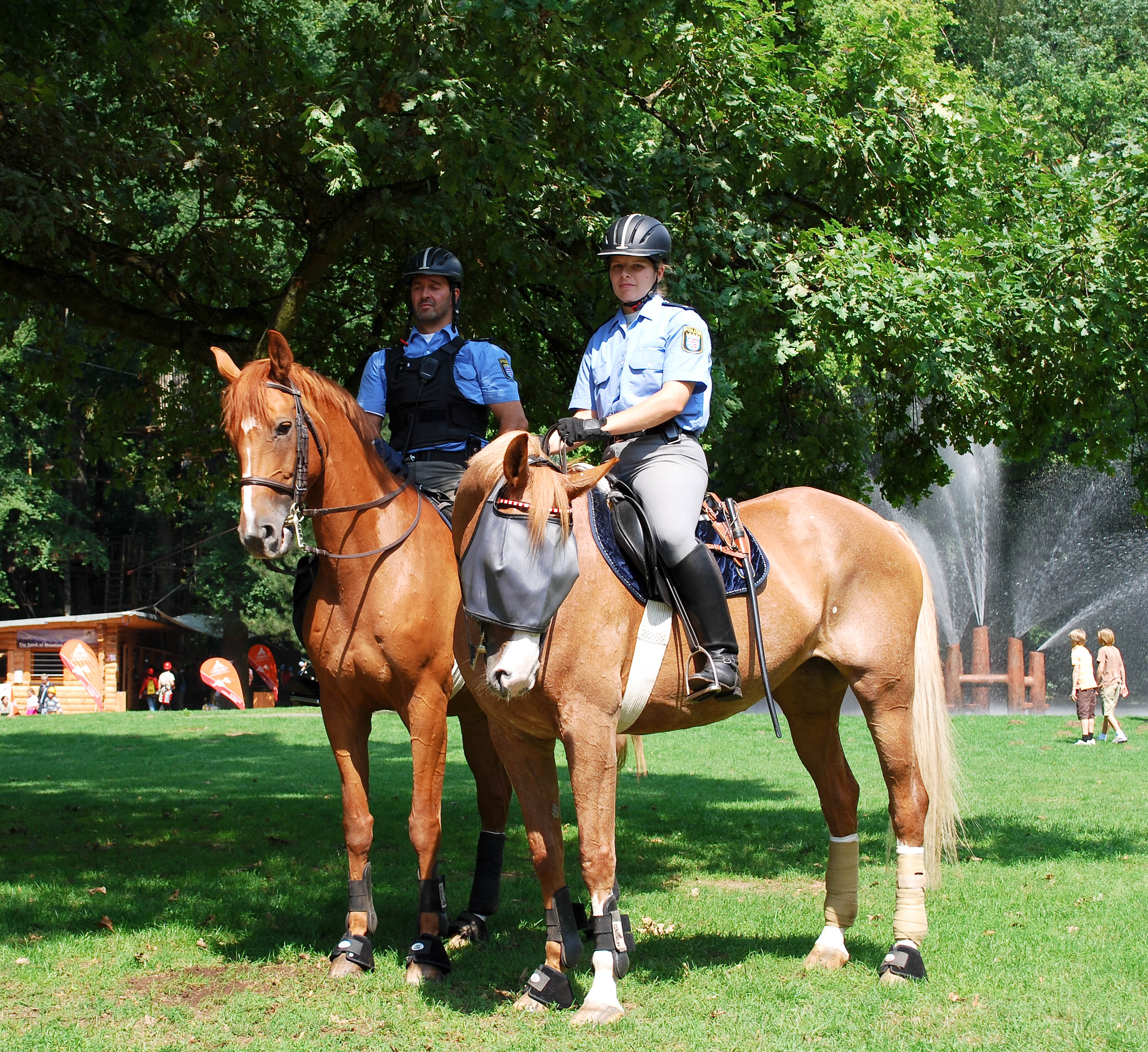 Berittene Polizeibeamte in Offenbach am Main, Hessen, Deutschland